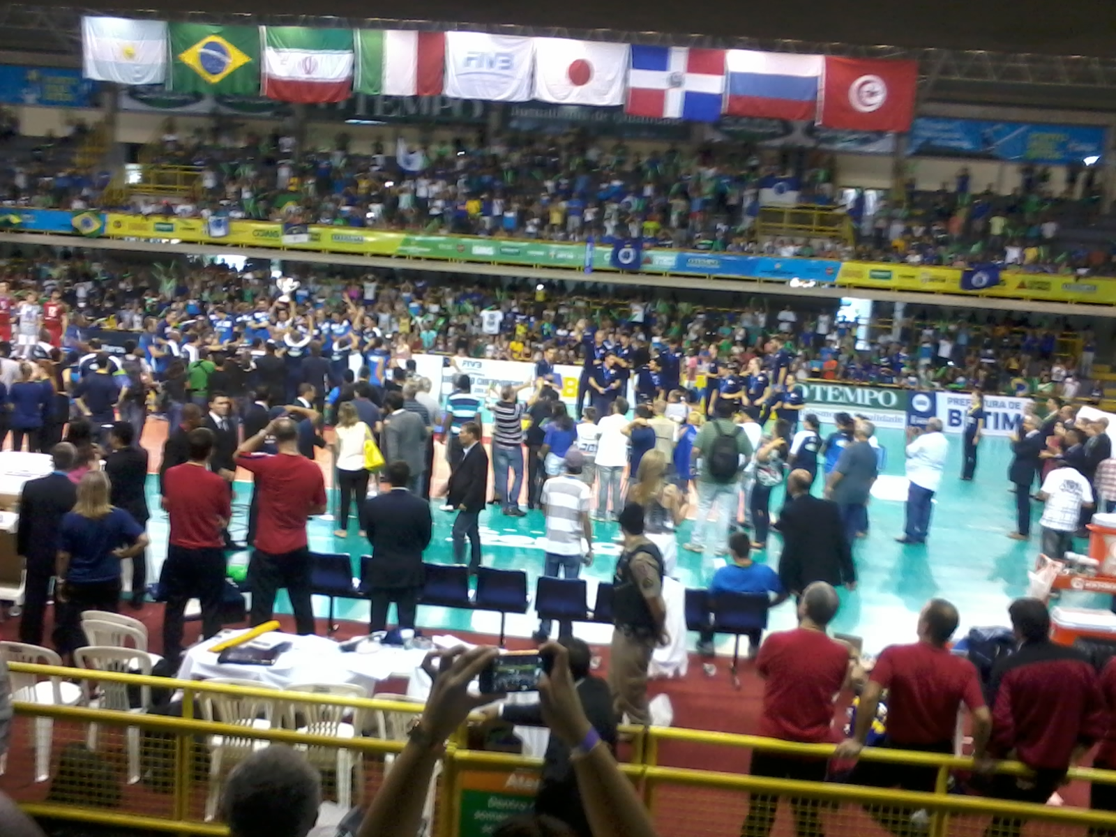 Pódio do Campeonato Mundial de Clubes de Voleibol Masculino de 2013 (Ginásio Divino Braga, Betim)